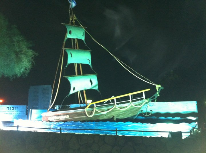 אנדטה שהוקמה במתנ"ס חצור הגלילית לזכר הנספים בציון 50 שנה לטביעת הספינה "אגוז"